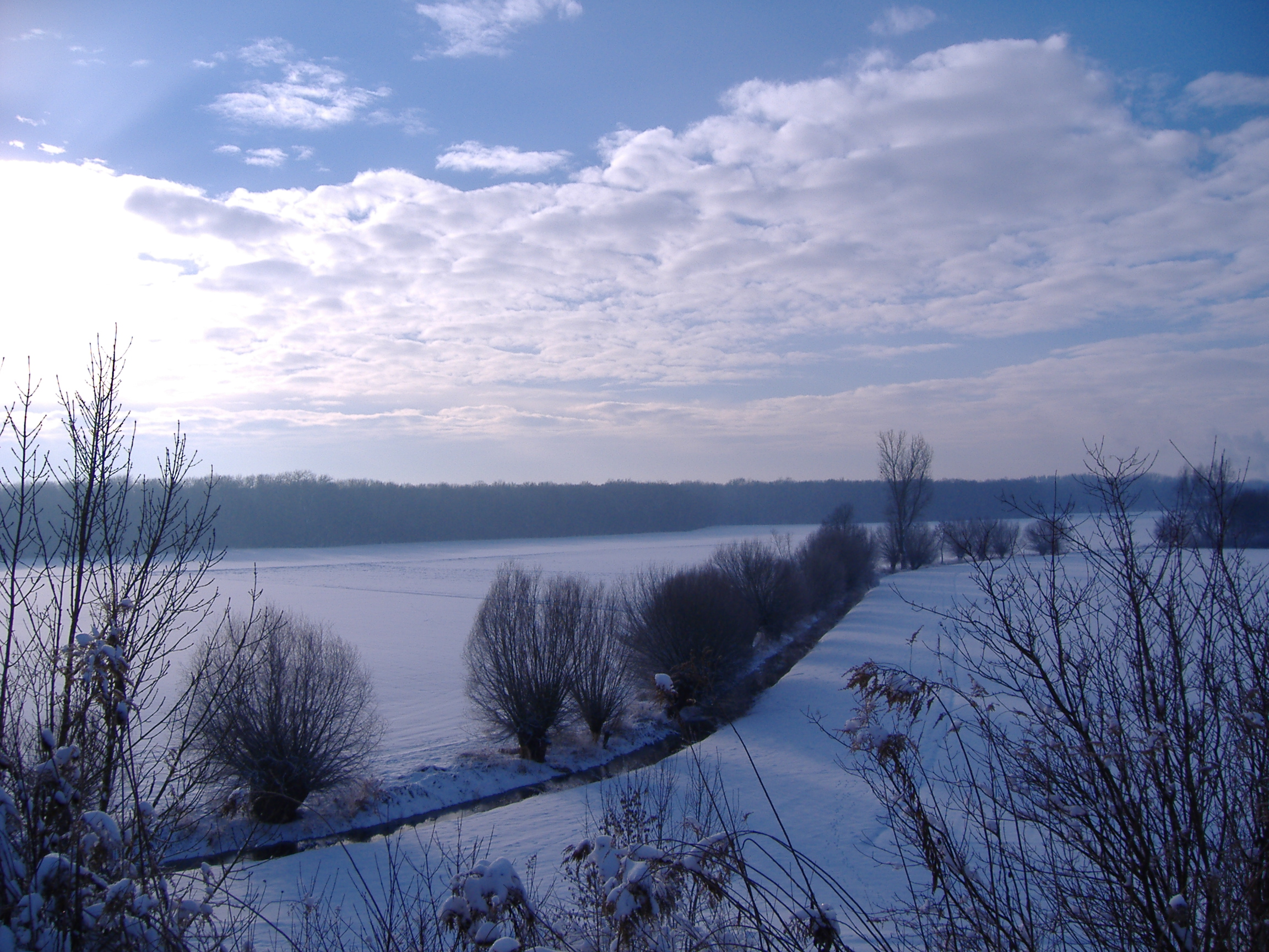 Donautal